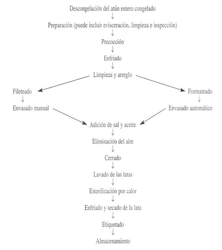 diagrama de flujo de la elaboracion del atun en conserva